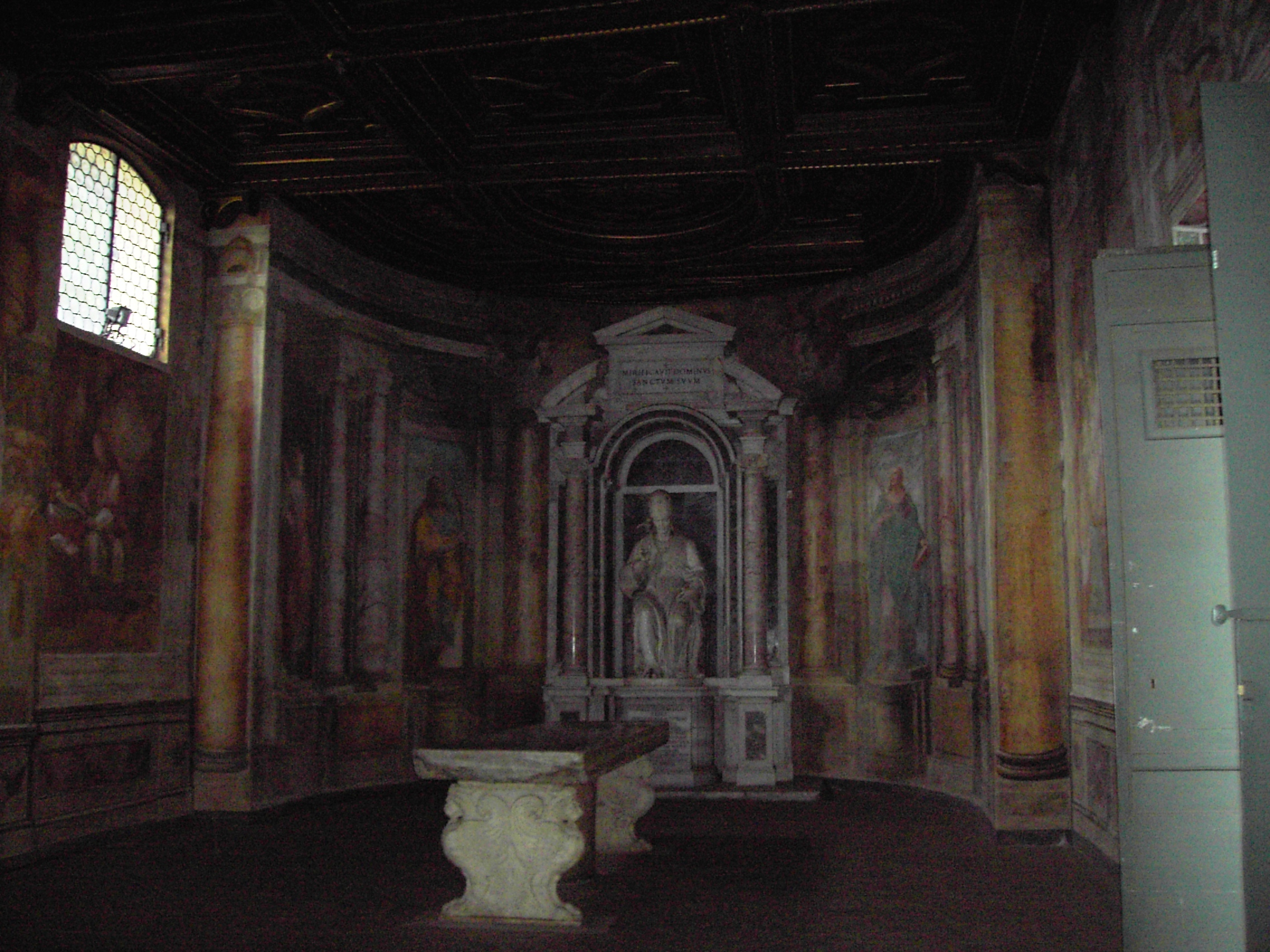 Roma, san Gregorio al Celio: Triclinium all'oratorio di santa Barbara